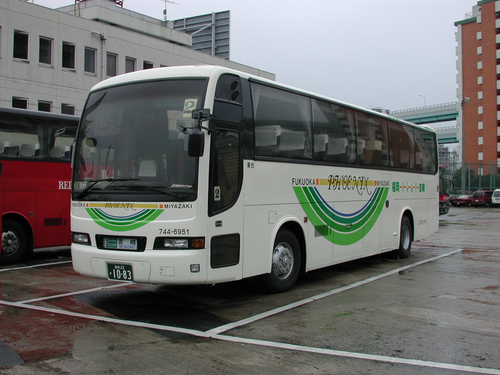 初期の車両 2001-3-25撮影